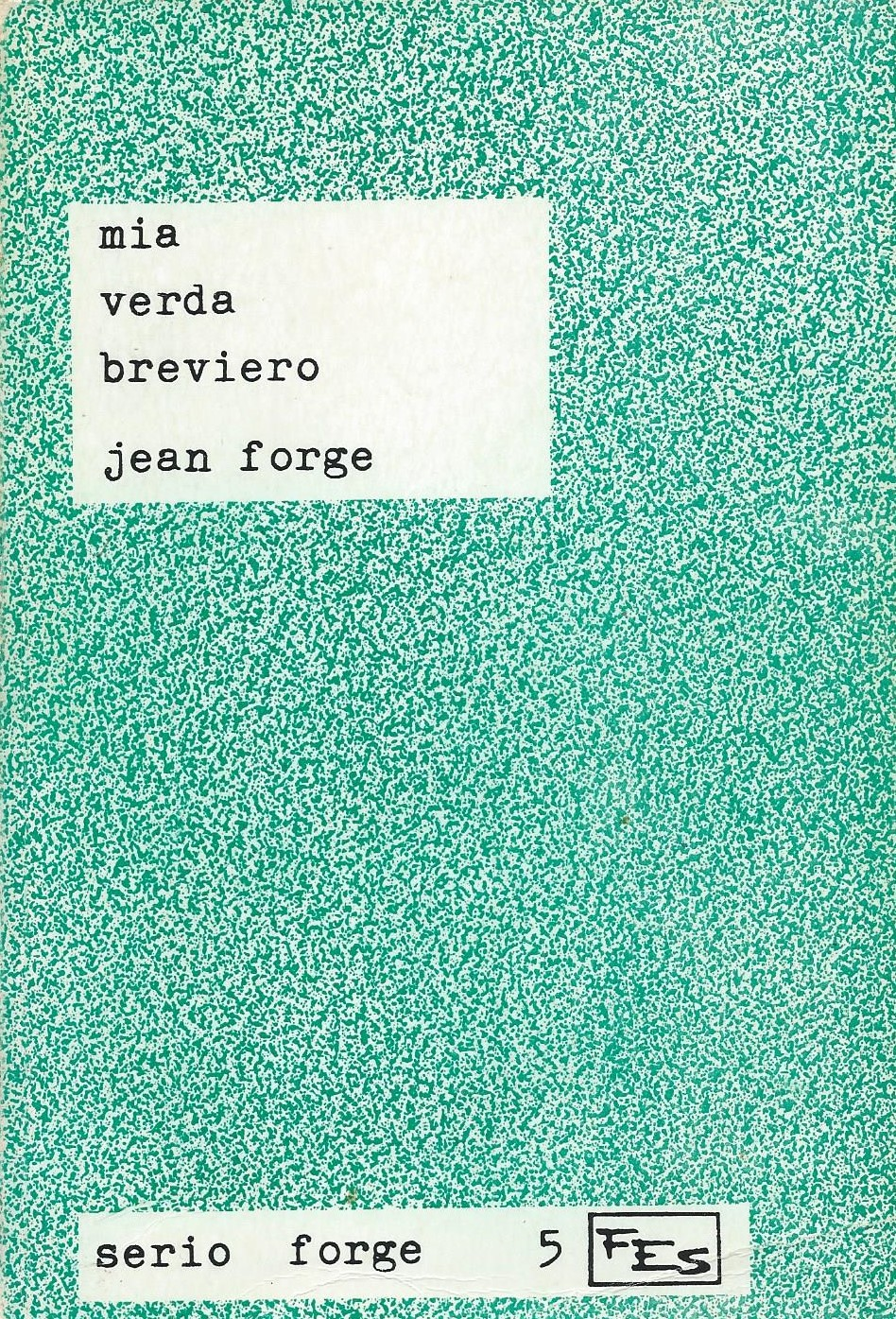 librokovrilo de "Mia Verda Breviero", 1974